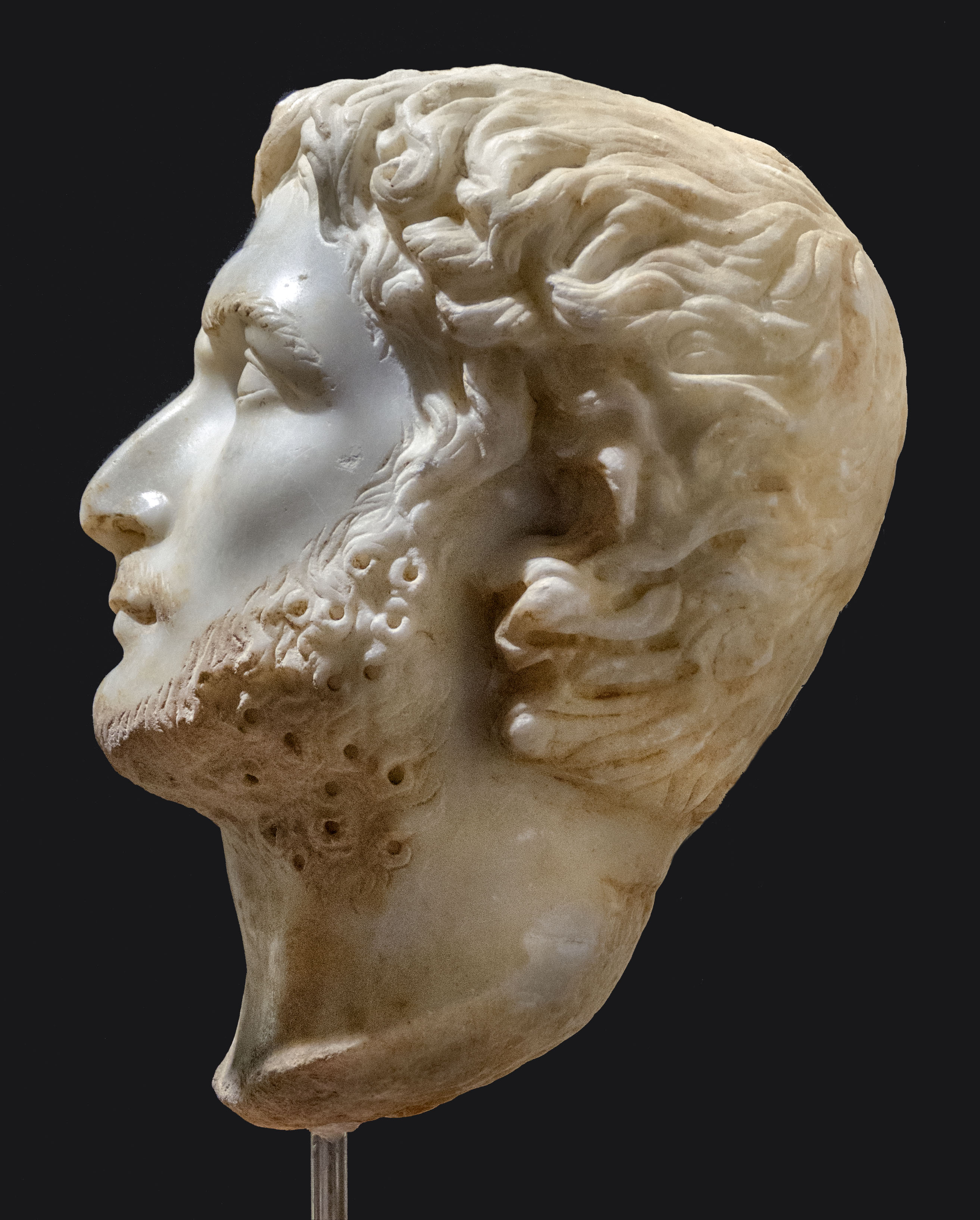 Retrato encontrado en la Villa romana de Milreu (Estói, Faro, Portugal), datado en siglo III. Publio Licinio Ignacio Galieno fue emperador del imperio romano entre los años 253 y 268